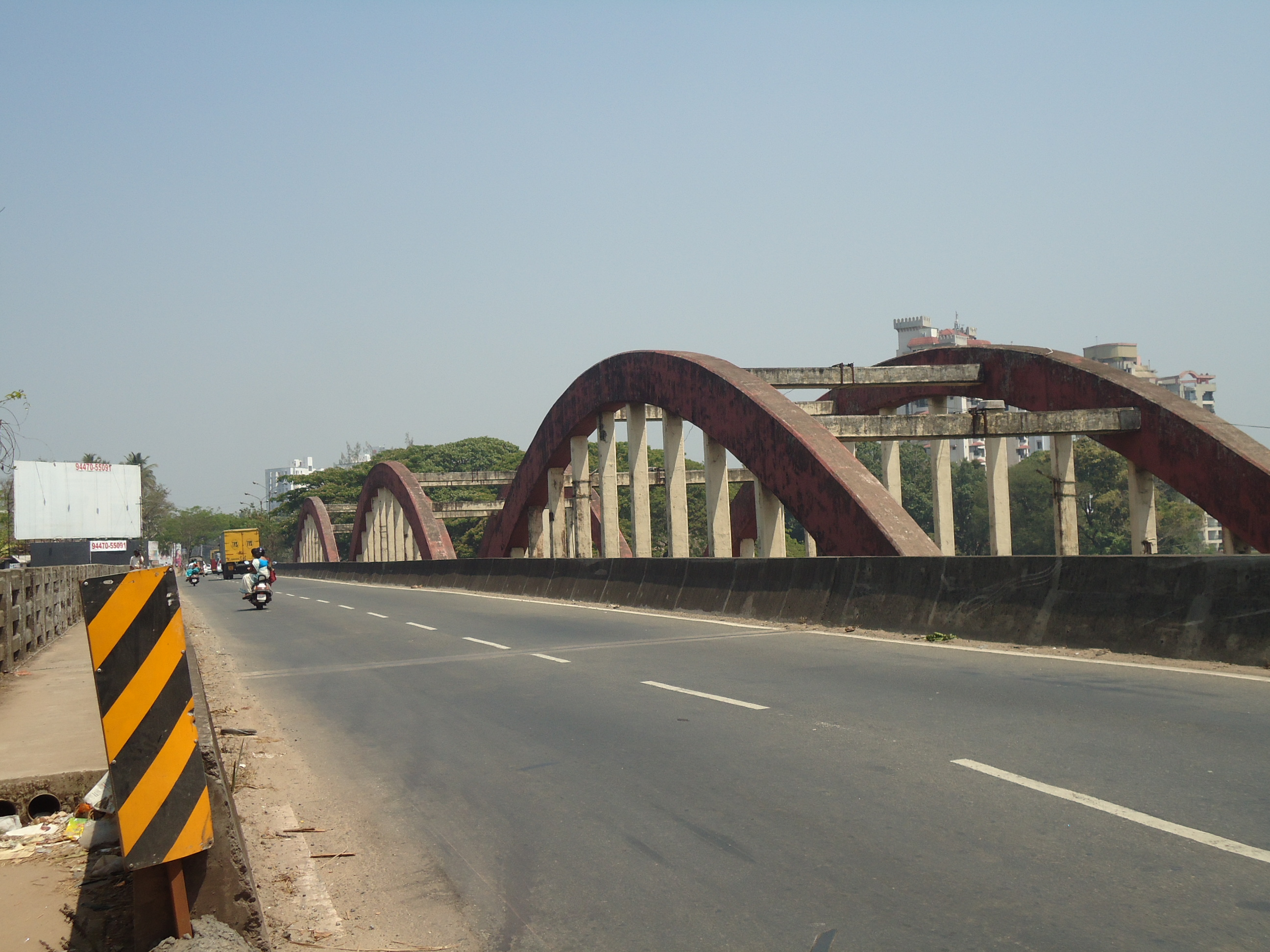 Mangalappuzha Bridge Aluva